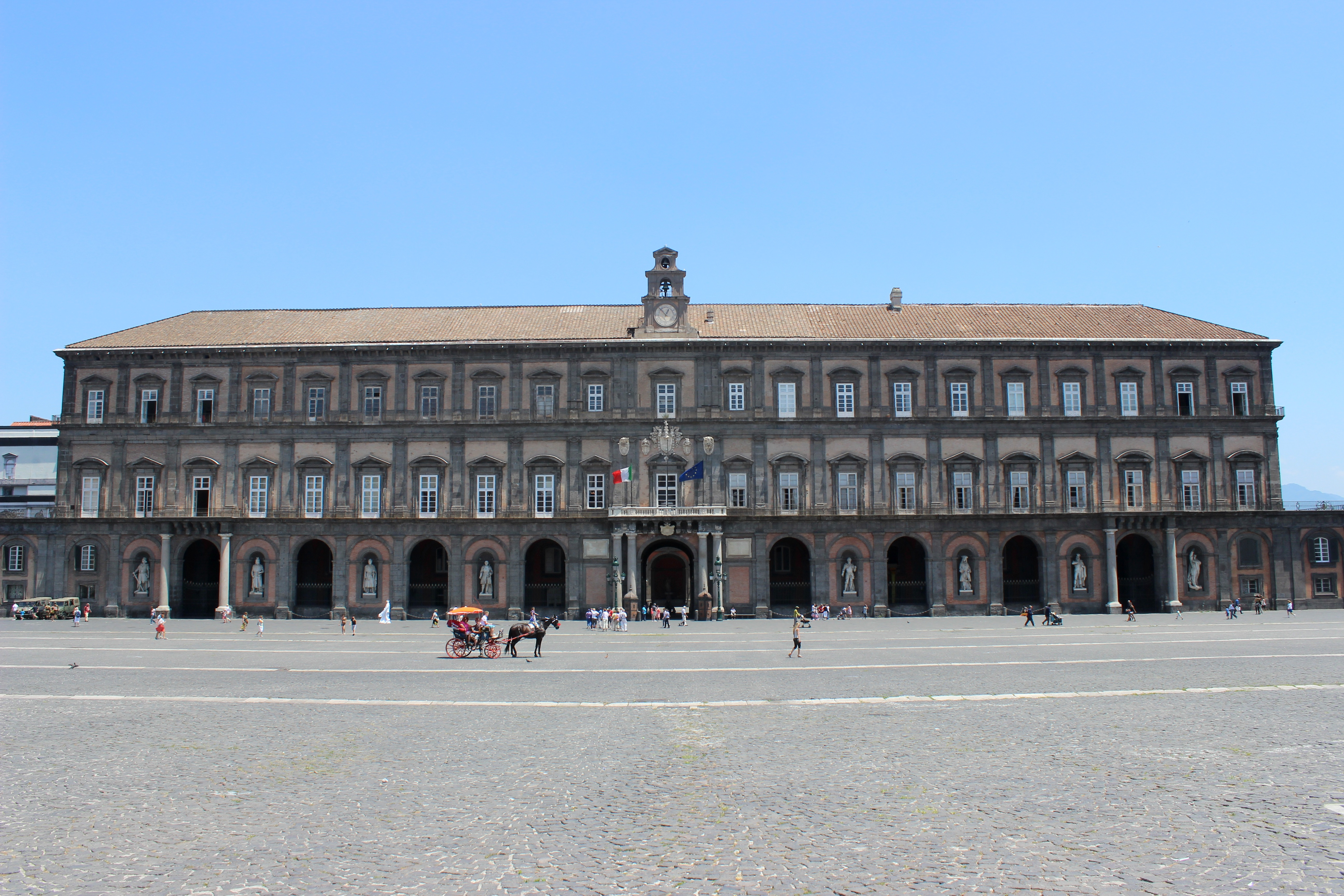 Nápoles. Palacio Real. Fachada oeste.